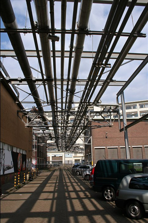 Strijp S, in Eindhoven; voormalig Philips fabrieken en kantoorgenbouwen